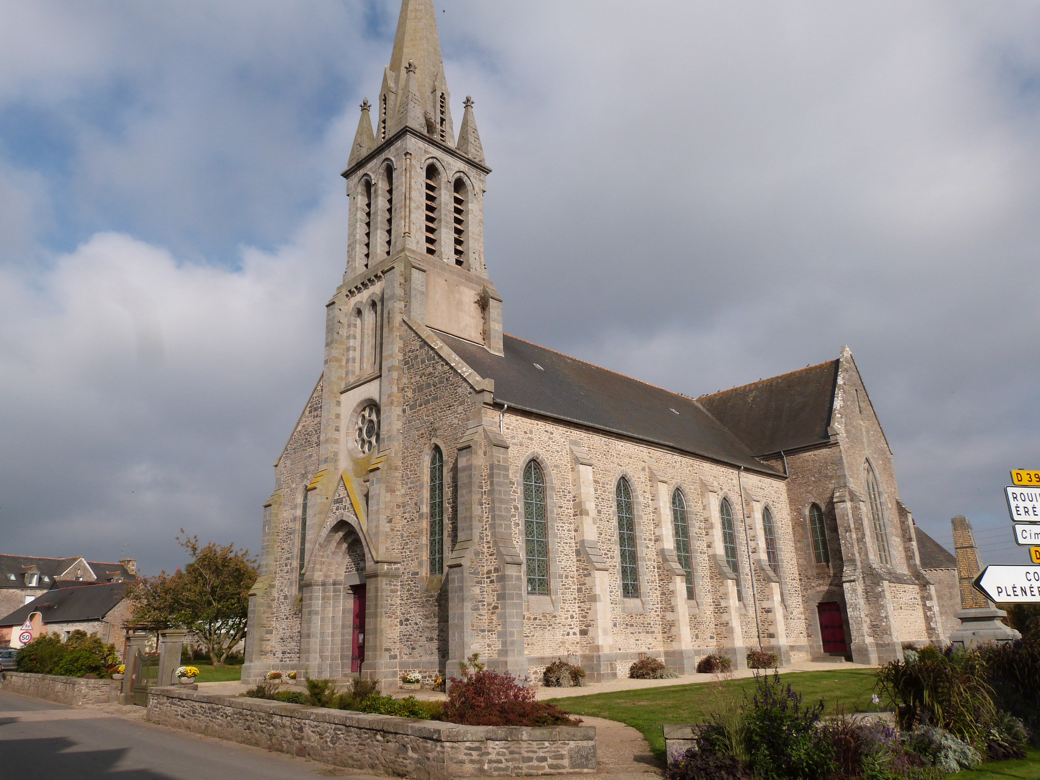 Eglise Saint-Pierre de Langourla